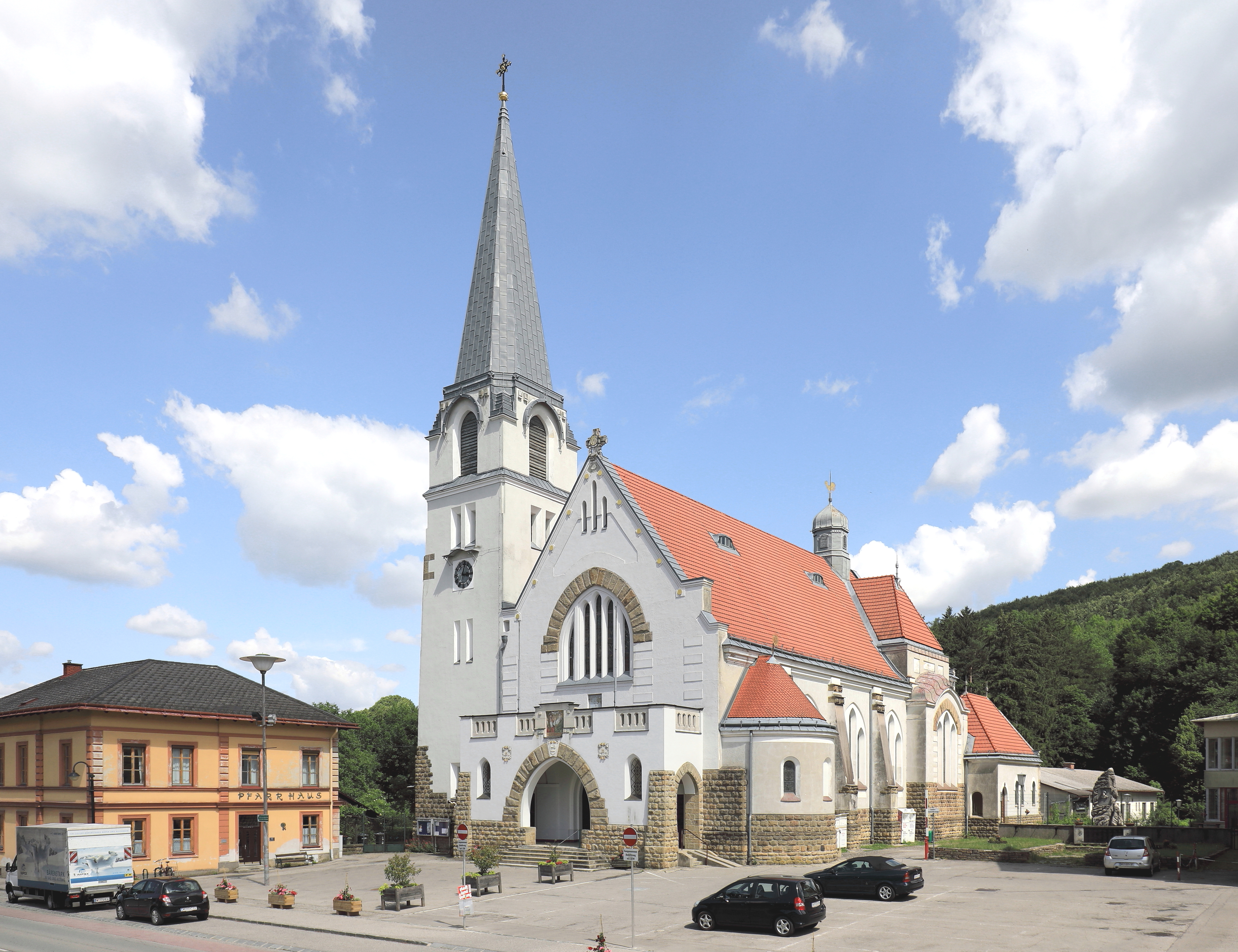 Westansicht der röm.-kath. Pfarrkirche hl. Dreifaltigkeit in der niederösterreichischen Stadtgemeinde Pressbaum mit Pfarrhof (links, 1881 errichtet) und Kriegerdenkmal (rechts).Von 1906 bis 1908 nach Plänen der Architekten Max Hegele und August Rehak als Kaiser-Franz-Joseph-Jubiläums-Kirche errichtet. Die Kirche mit ihrem speziellen Stil stellt in der Sakralarchitektur Niederösterreichs ein bedeutendes Denkmal dar und steht unter Denkmalschutz.